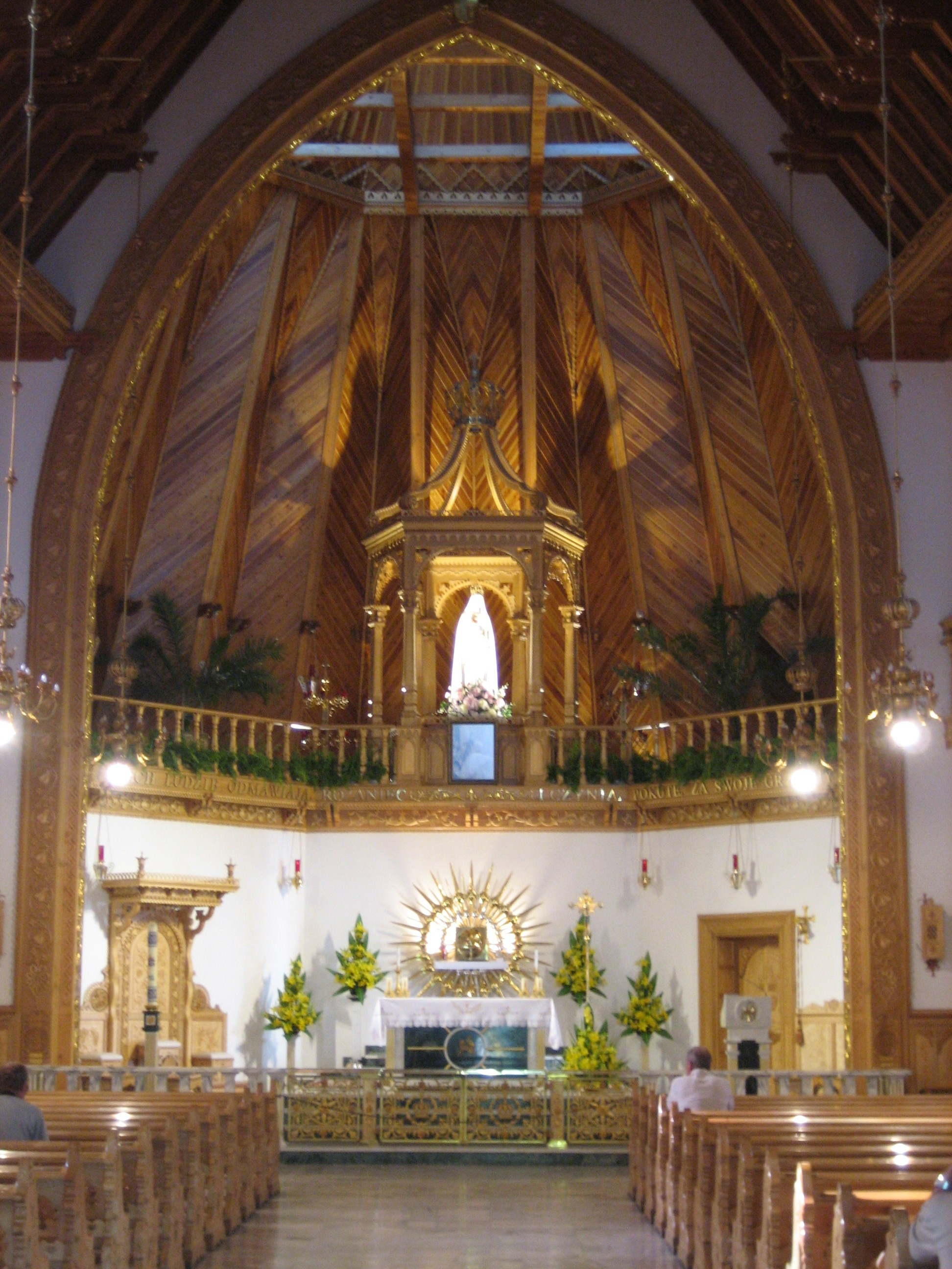 Zakopane - Sanktuarium Matki Boskiej Fatimskiej.